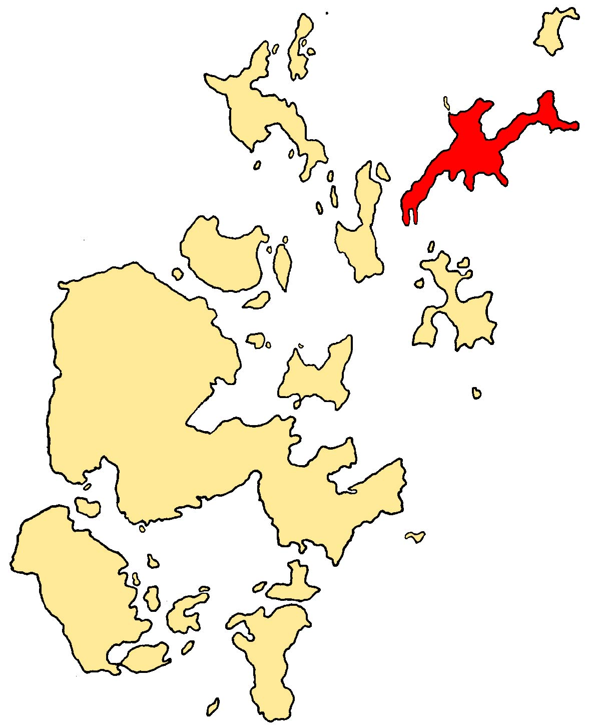 Sanday